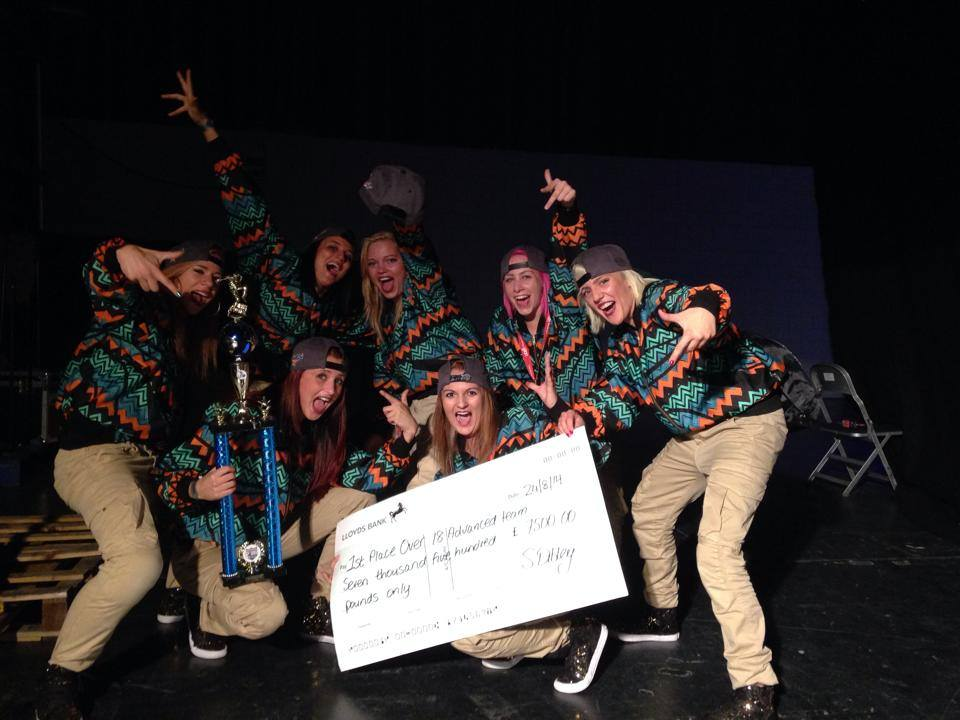 World Championships United Dance Organisation, 2014